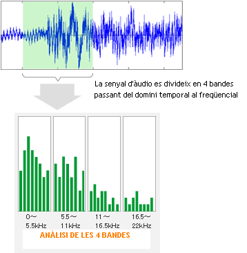 Senyal d'àudio separada en bandes